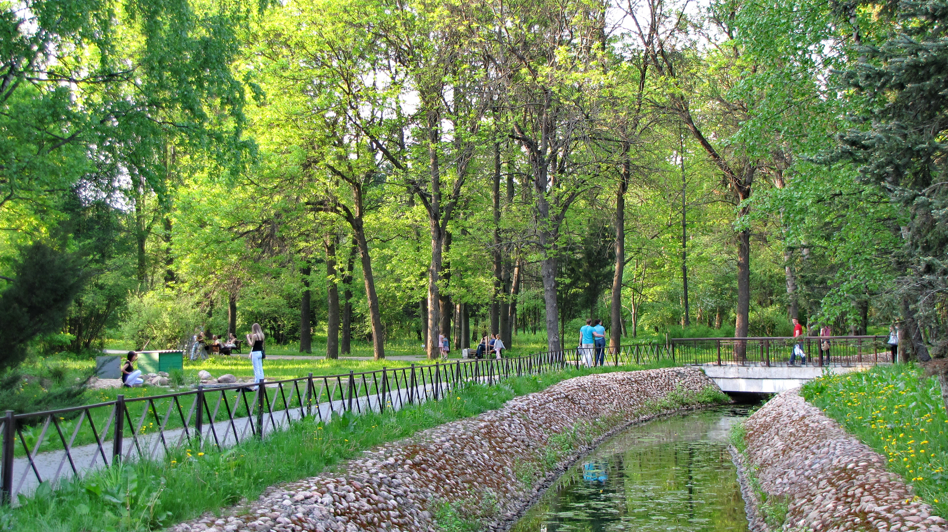 Беларуская (тарашкевіца): Цэнтральны батанічны сад Нацыянальнай акадэміі навук Беларусі. г. Менск This is a photo of Belarusian heritage monument. Reference number: 712Г000155 ( WLM)